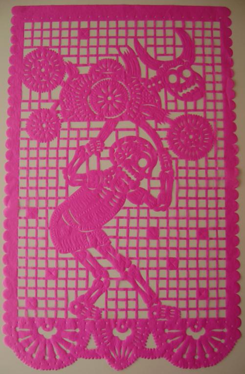 ejemplo de papel picado